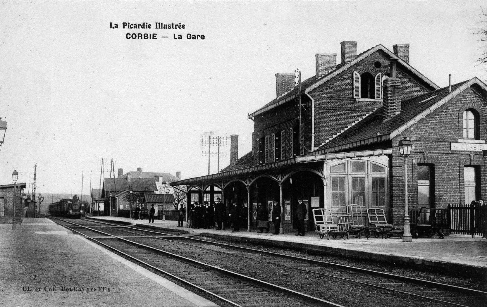 L'intérieur de la gare de Corbie, sur la ligne de Paris à Lille, vers 1900.